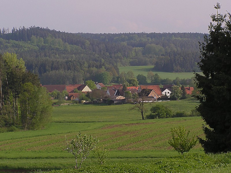 Welchenholz vom Brunnenberg